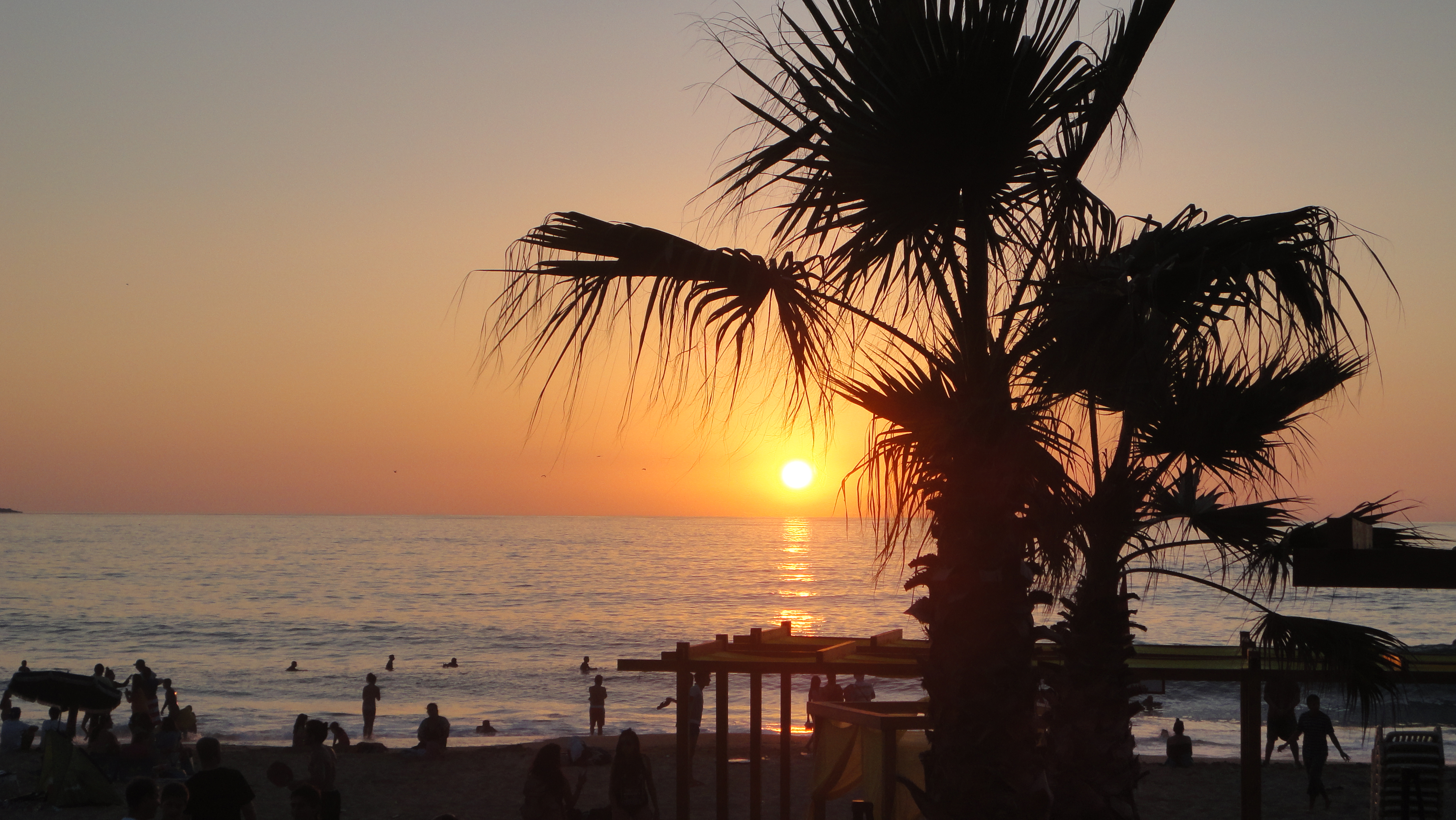 playa Reñaca V region